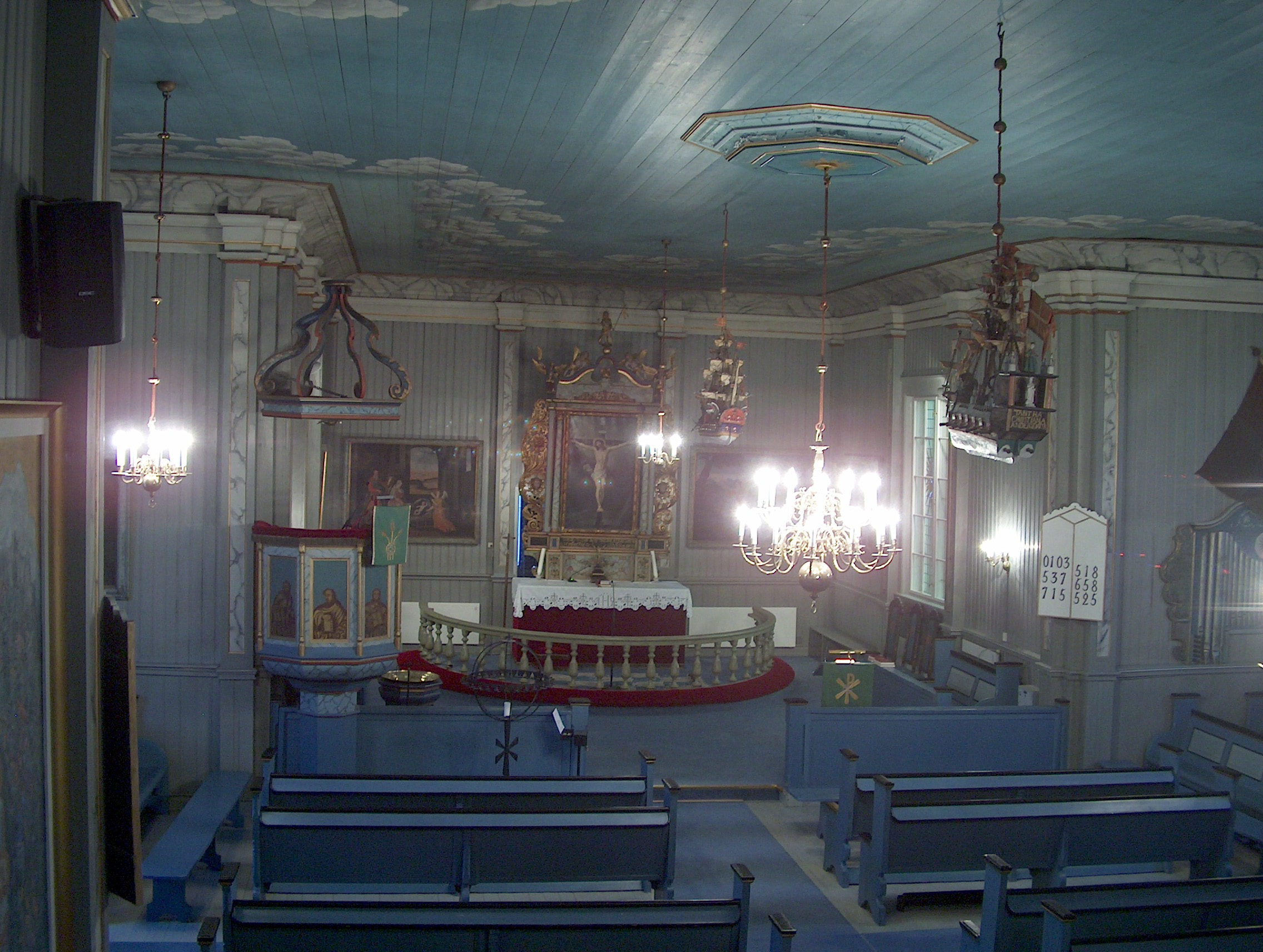 Lunder kirke, Sokna (interiør)